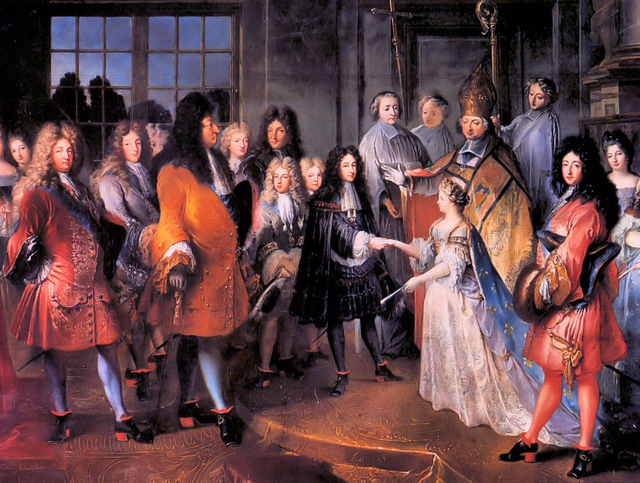 Mariage du Duc de Bourgogne, Louis de France (1682-1712).